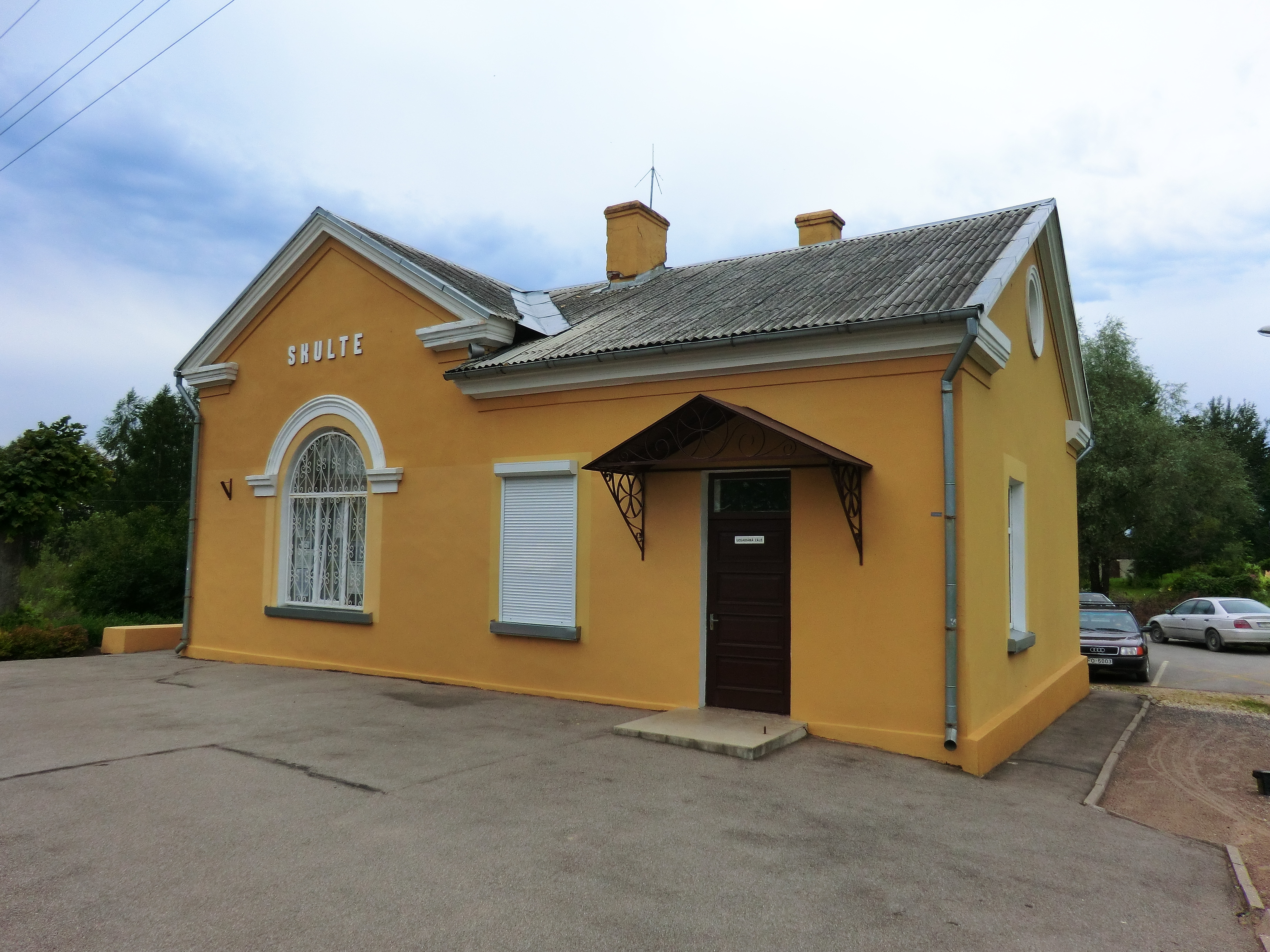 ст. Скулте (3)